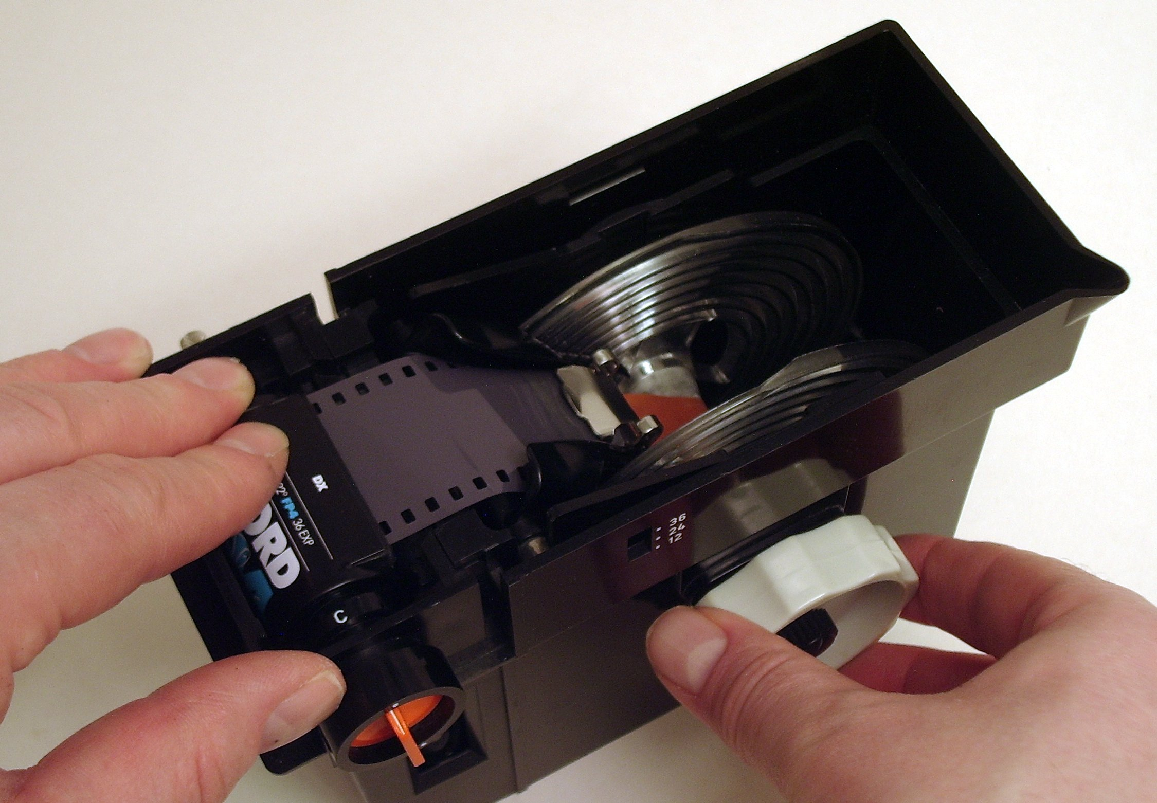 Agfa Rondinax 35 U / Film einlegen (Bild7)- Agfa Rondinax 35 U / Inserting film (part 7)